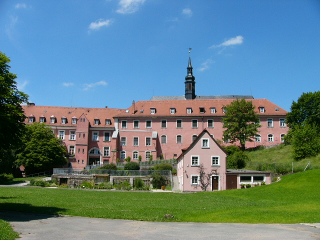 Gesamtansicht von Schloss/Kloster Himmelkron